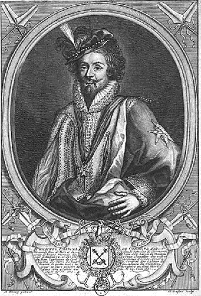 Portrait de Philippe-Emmanuel de Gondi